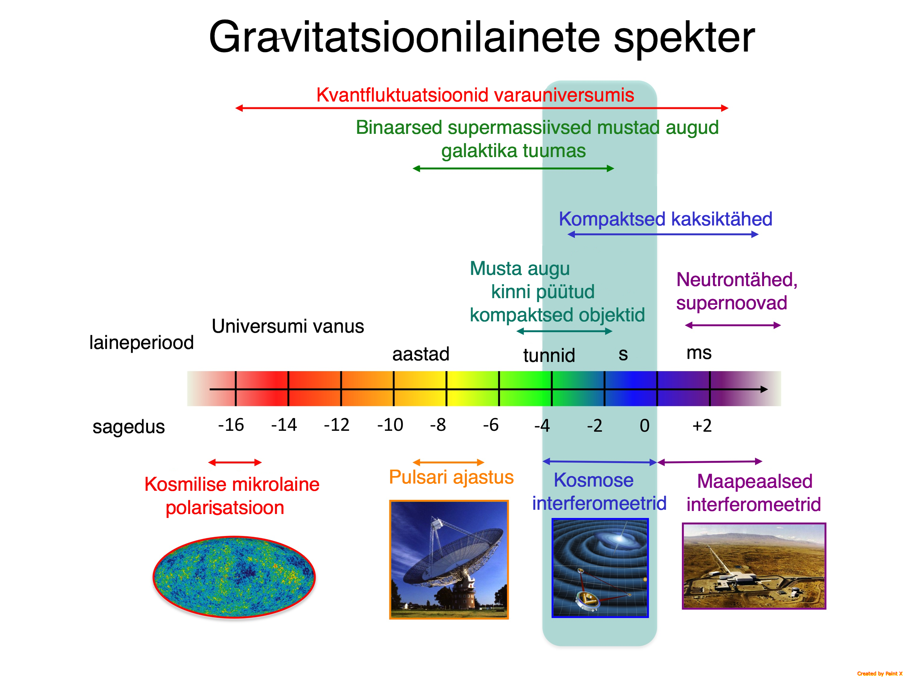 Gravitatsioonilainete spekter, allikad ja detektorid.